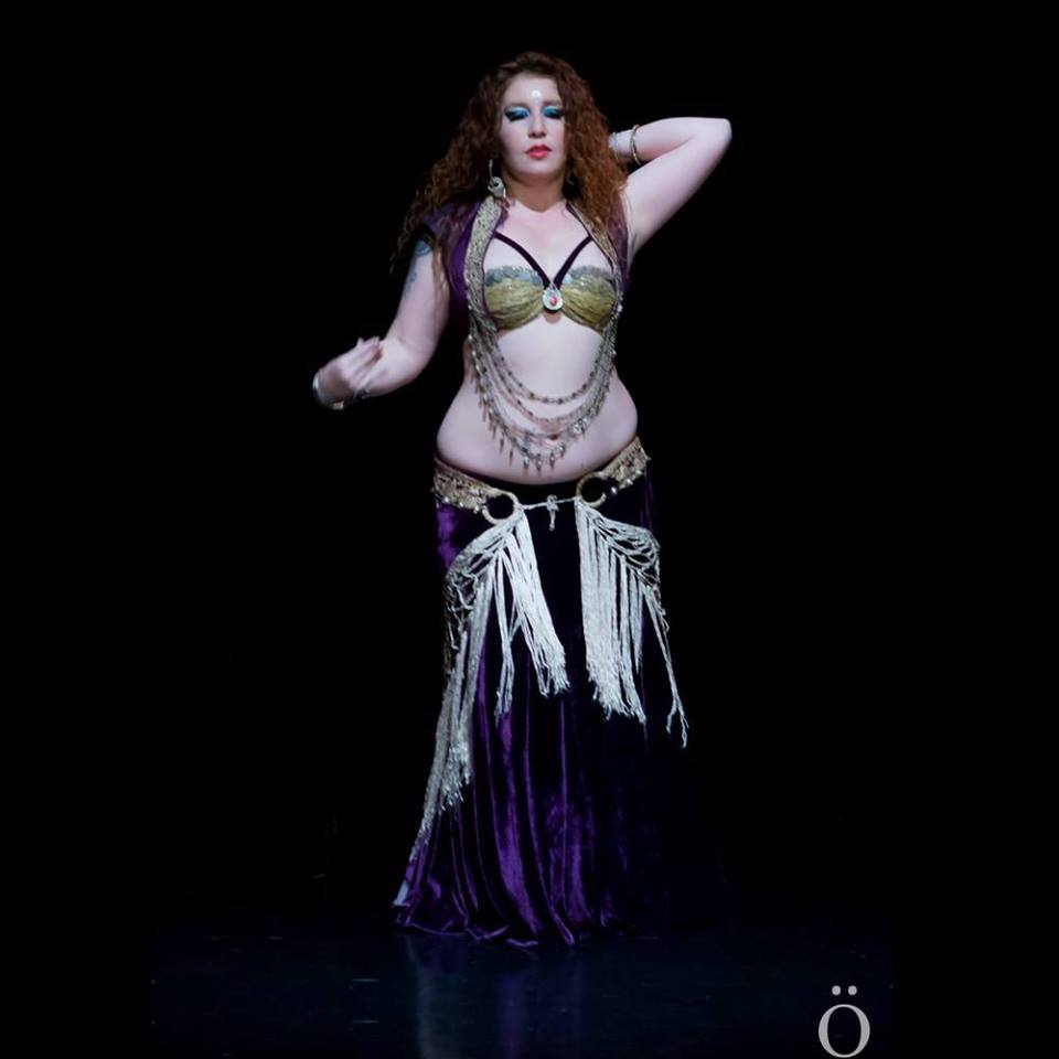 Marisú Parada, Bailarina y Profesora de Danza del Vientre Tribal